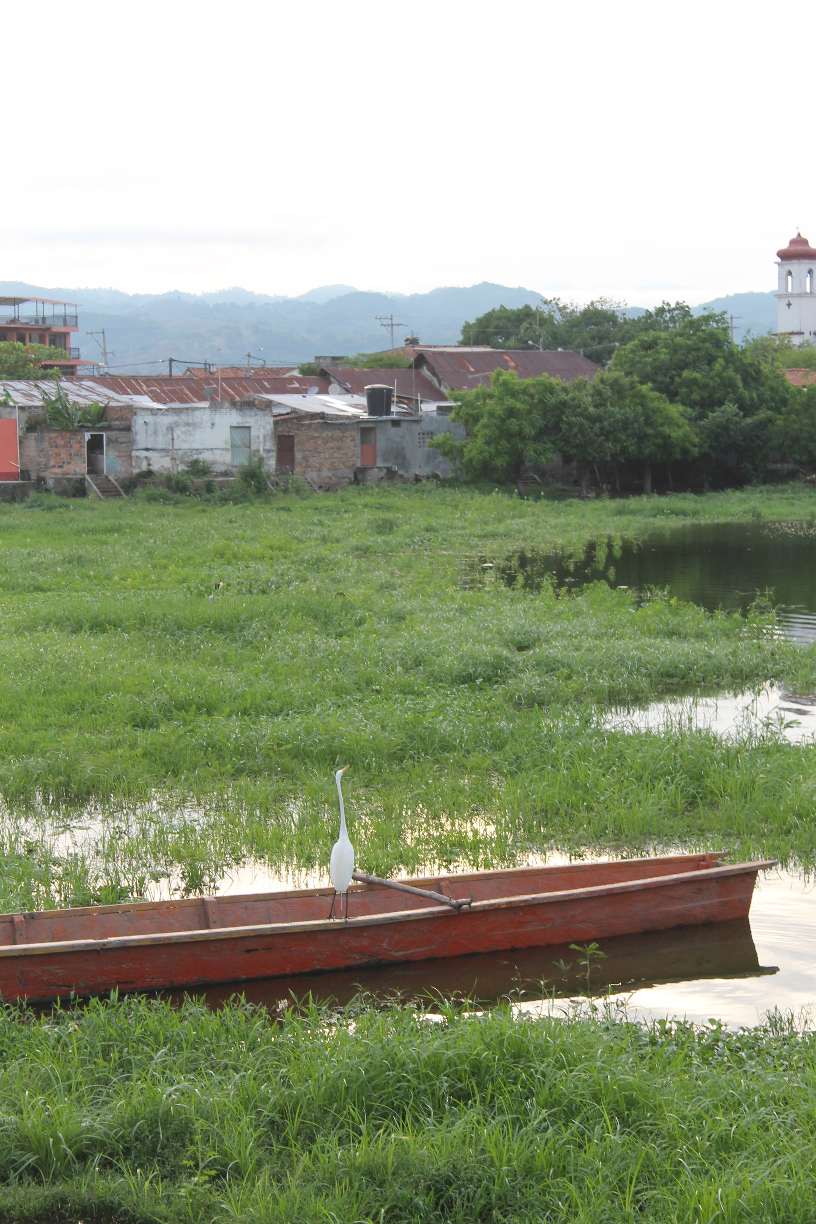 Ciénega Simiteña